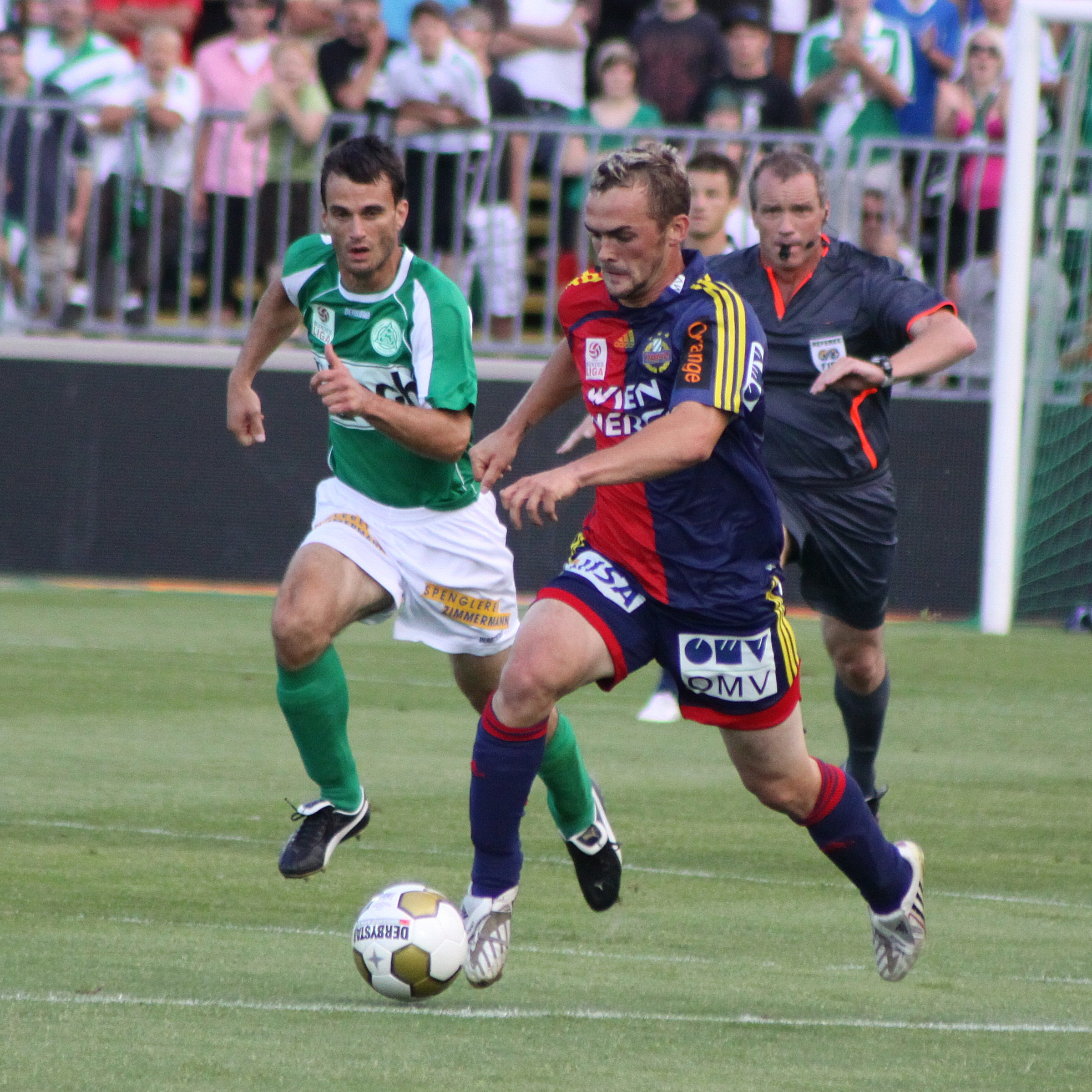 Erwin Hoffer - SK Rapid Wien (4)